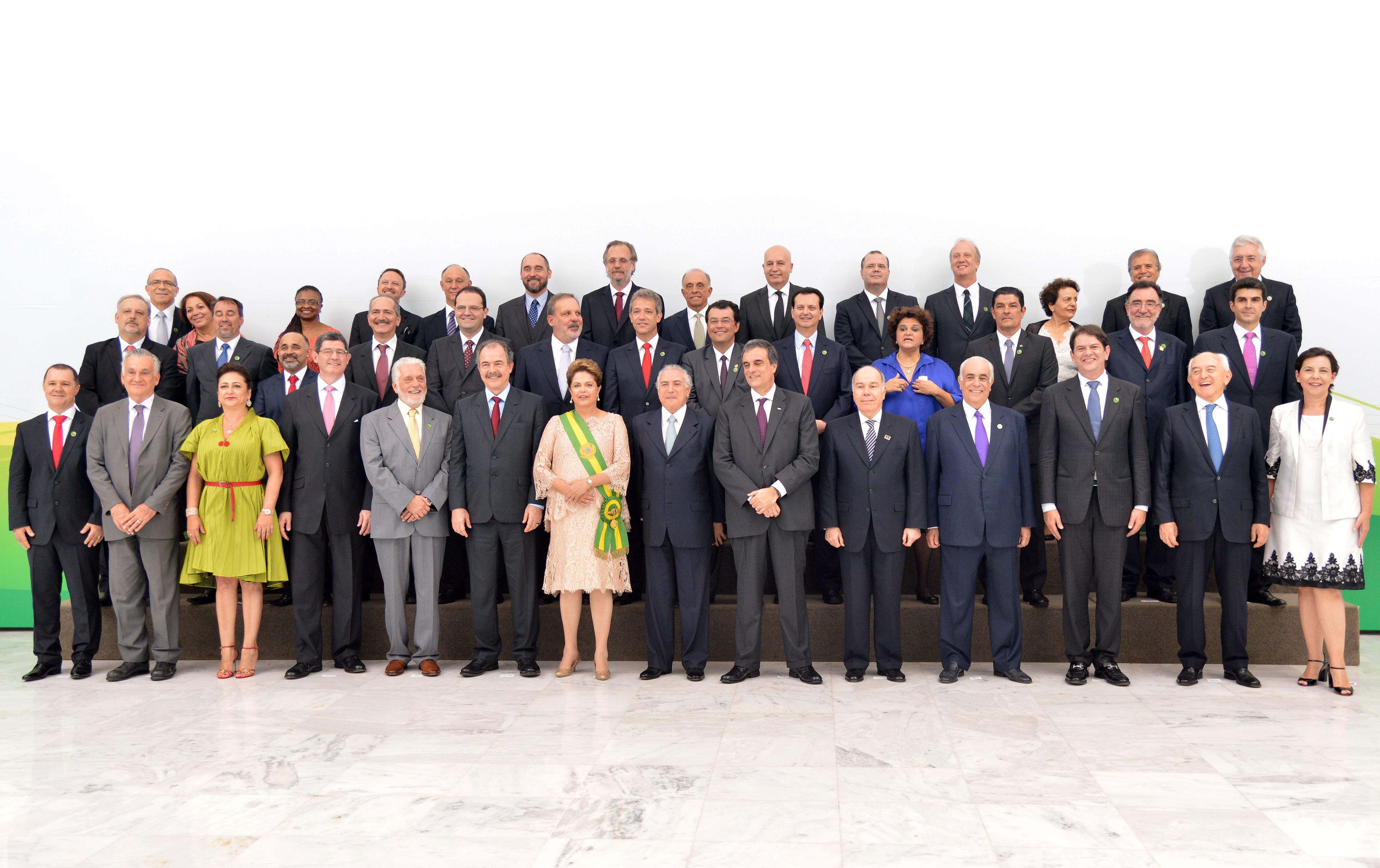 Foto oficial da presidenta do Brasil, Dilma Rousseff, ao lado do vice-presidente Michel Temer e ministros empossados para o segundo mandato.